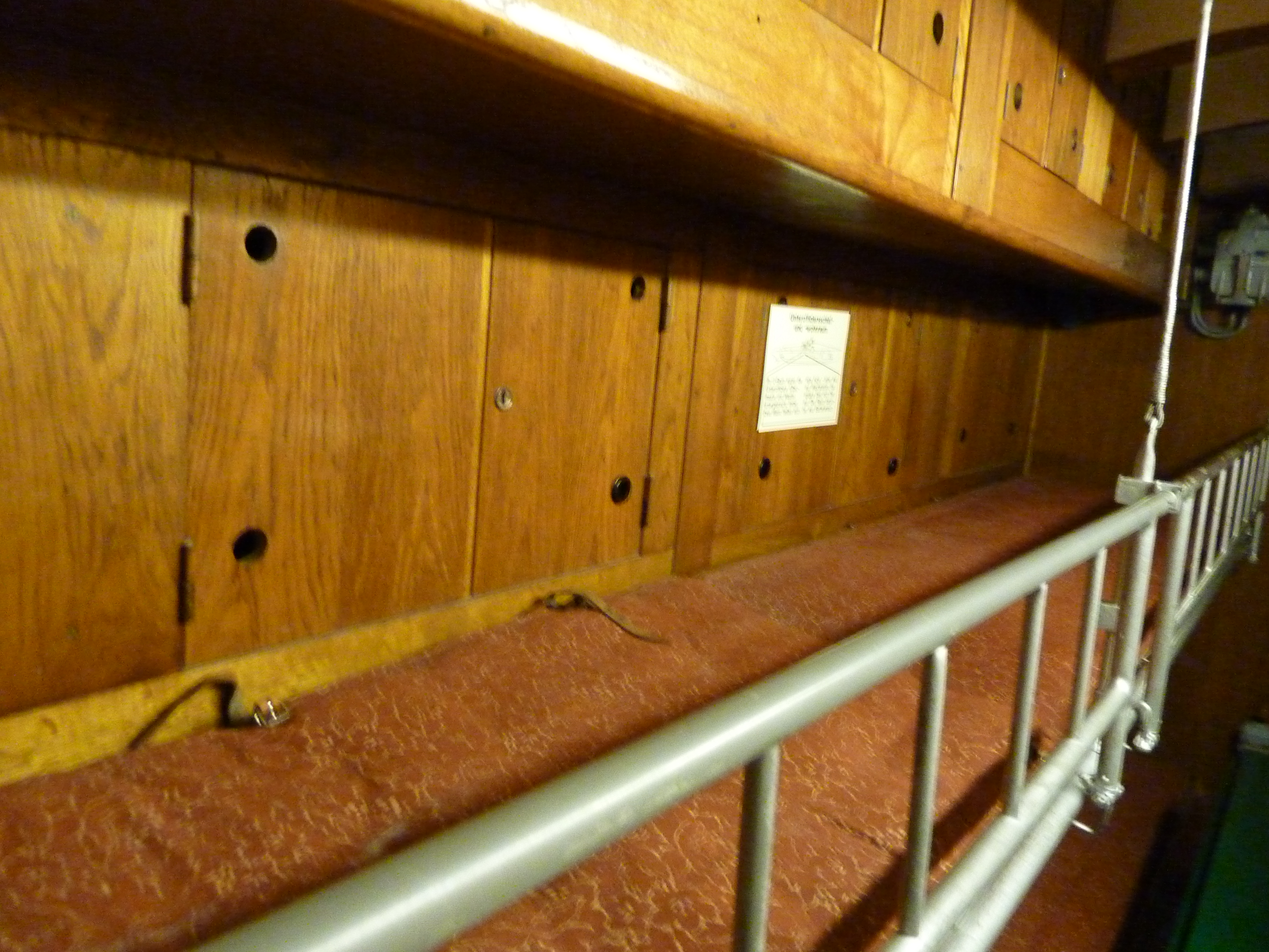 Unteroffiziersschlaf- und -wohnraum, U 995. Im U-Raum waren die Unteroffiziere (Obermaate und Maate) untergebracht. Immer zwei Mann teilten sich eine Koje - einer war auf Wachstation, der andere hielt sich hier auf. Der Raum darunter war Batterieraum.